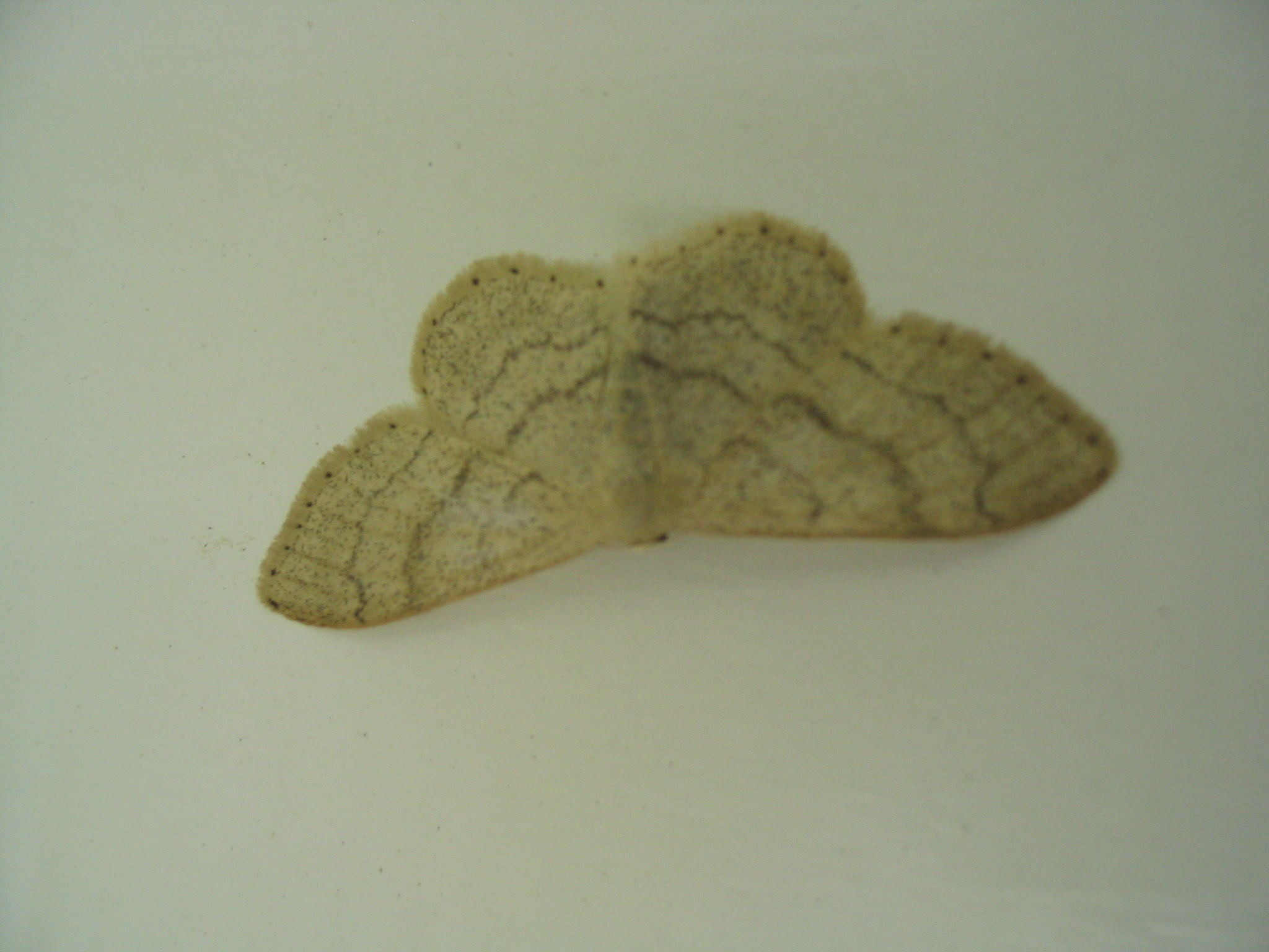 Mutkakulmumittari Idaea aversata f. remutata